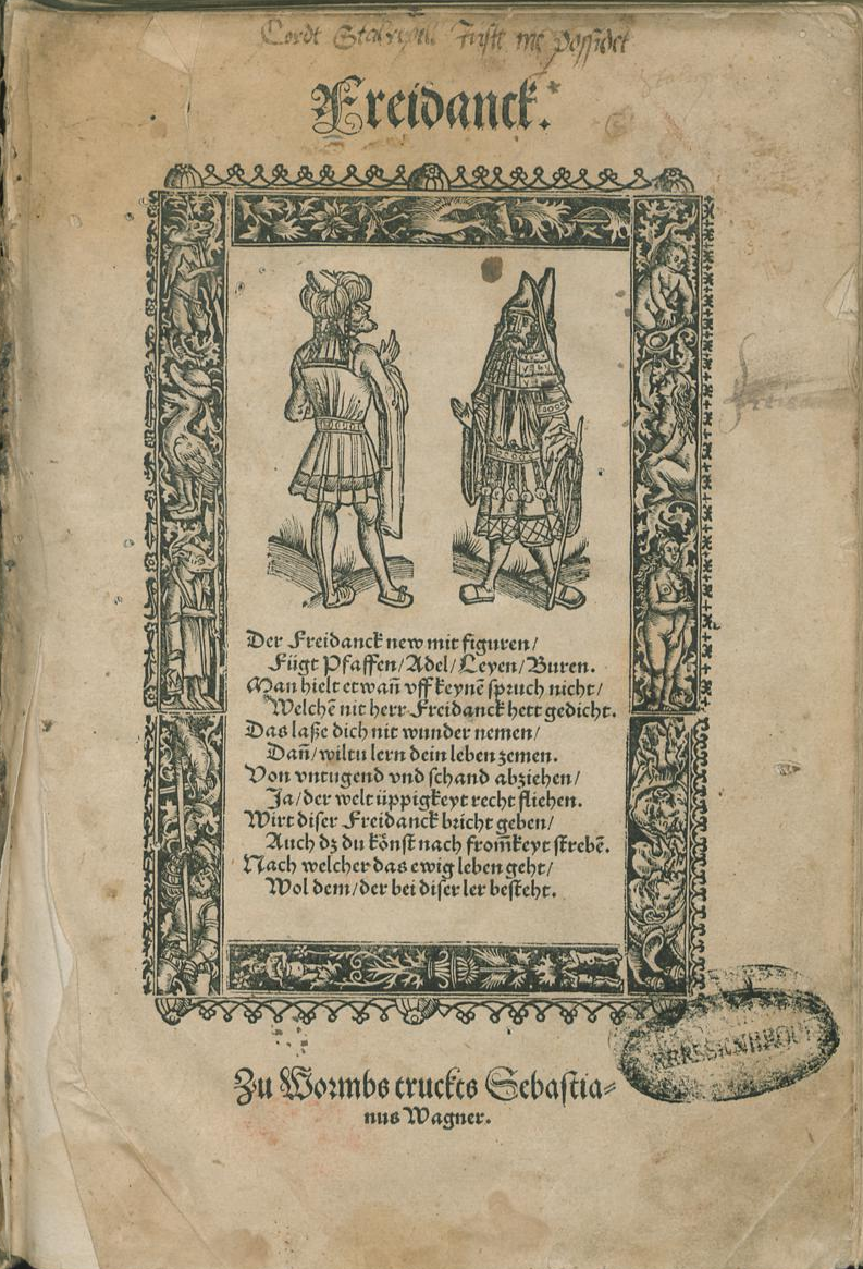 Freidank, Spruchdichtung